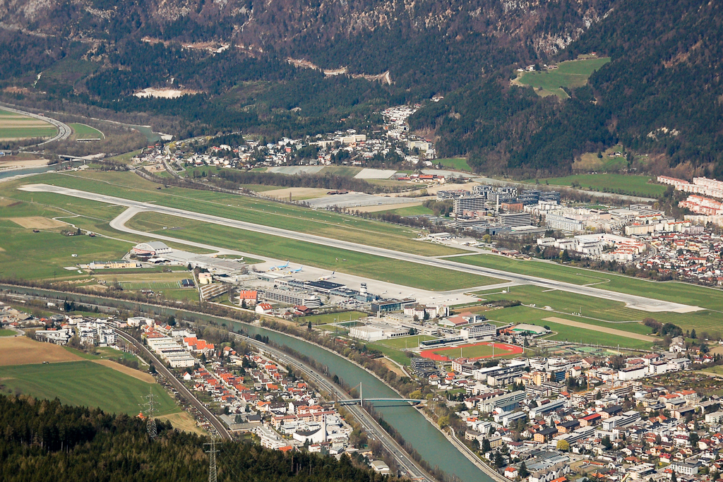 Übersicht vom Innsbrucker Flughafen